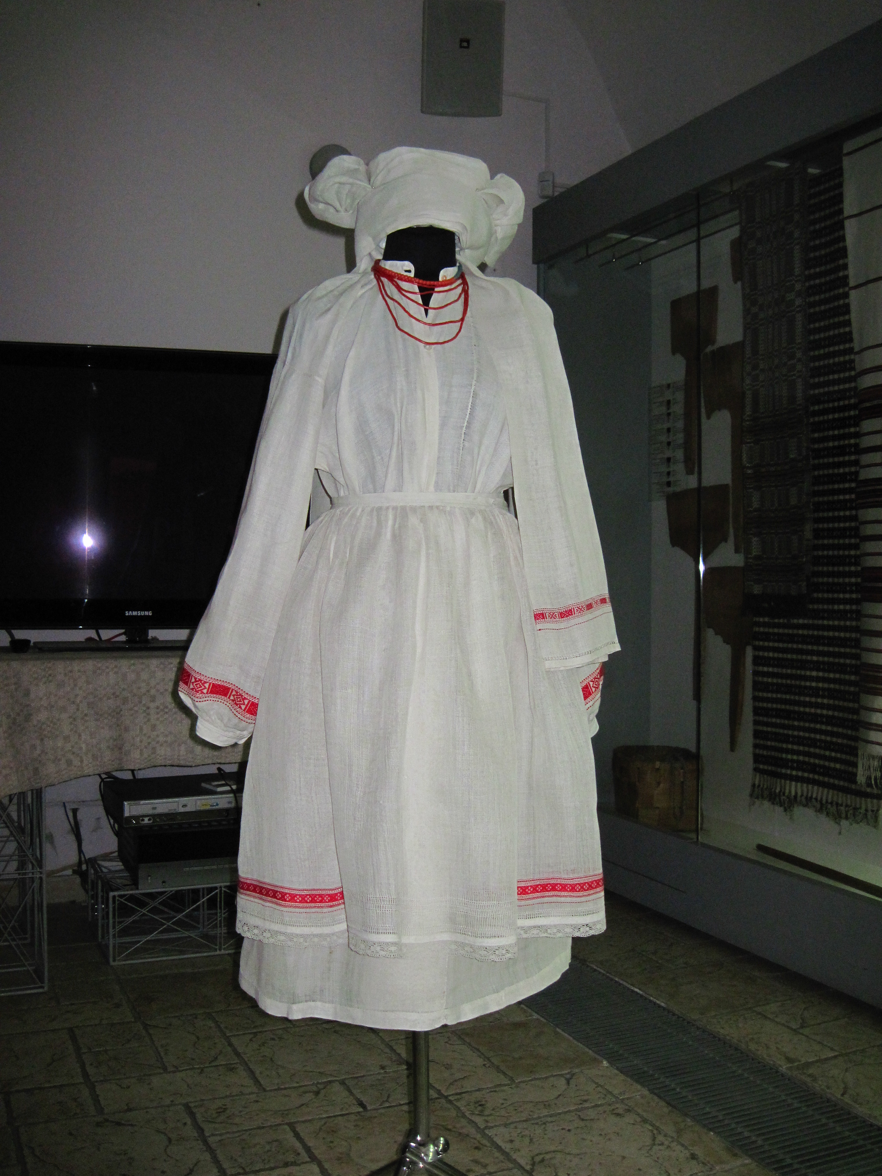 Серпанковий стрій с. Крупове Дубровицького району з колекції Сарненського історико-етнографічного музею на презентації реконструкції серпанкового строю від Майстерні історичного ткацтва "Легенди Волині" в музеї Івана Гончара